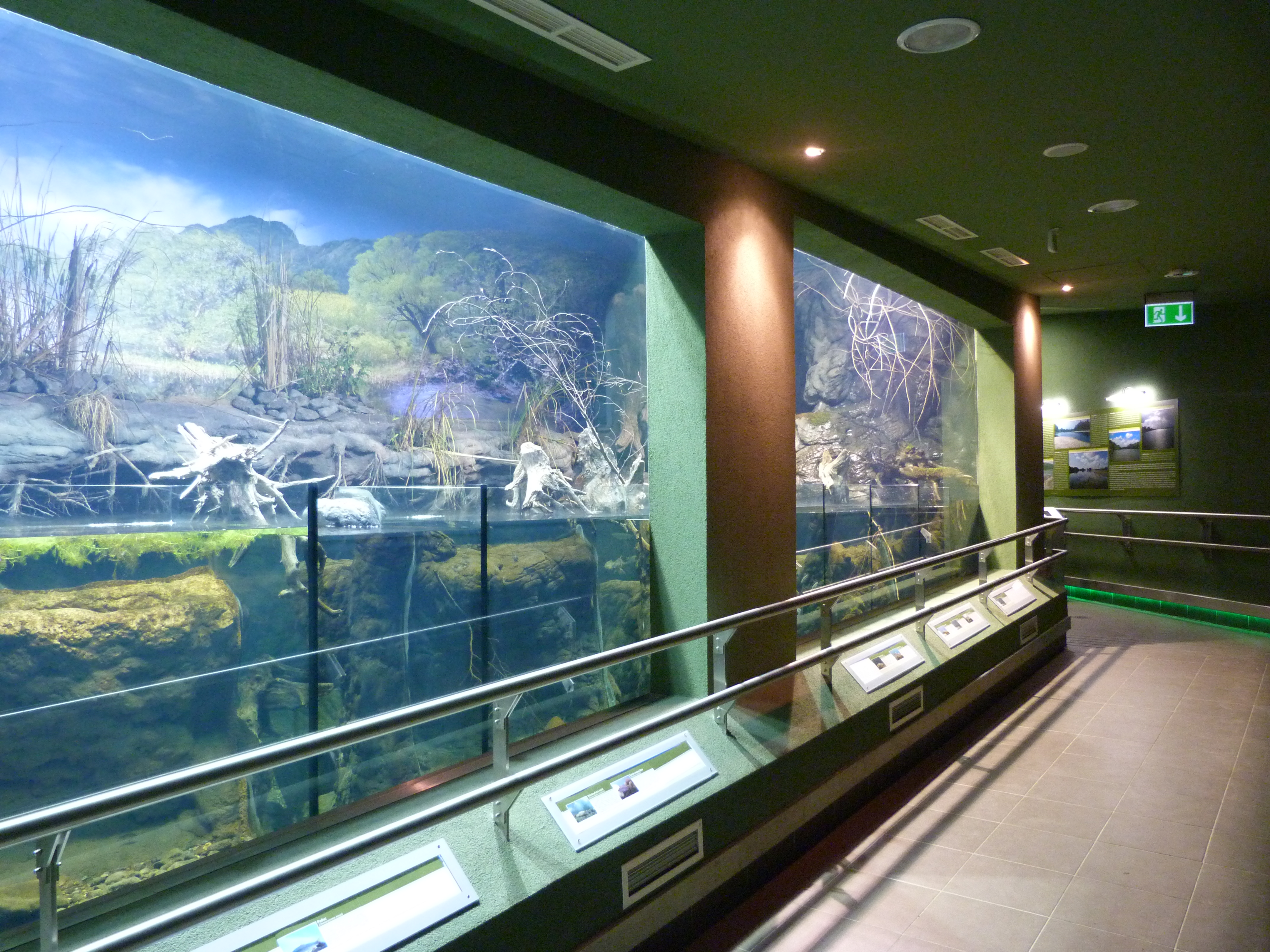 A felvétel 2012. július 25 -én készült Poroszlón, a Tisza-tavi Ökocentrumban. Megjelent Creative Commons alatt a Metapolisz DVD sorozatban. Forrás: tiszataviokocentrum.hu